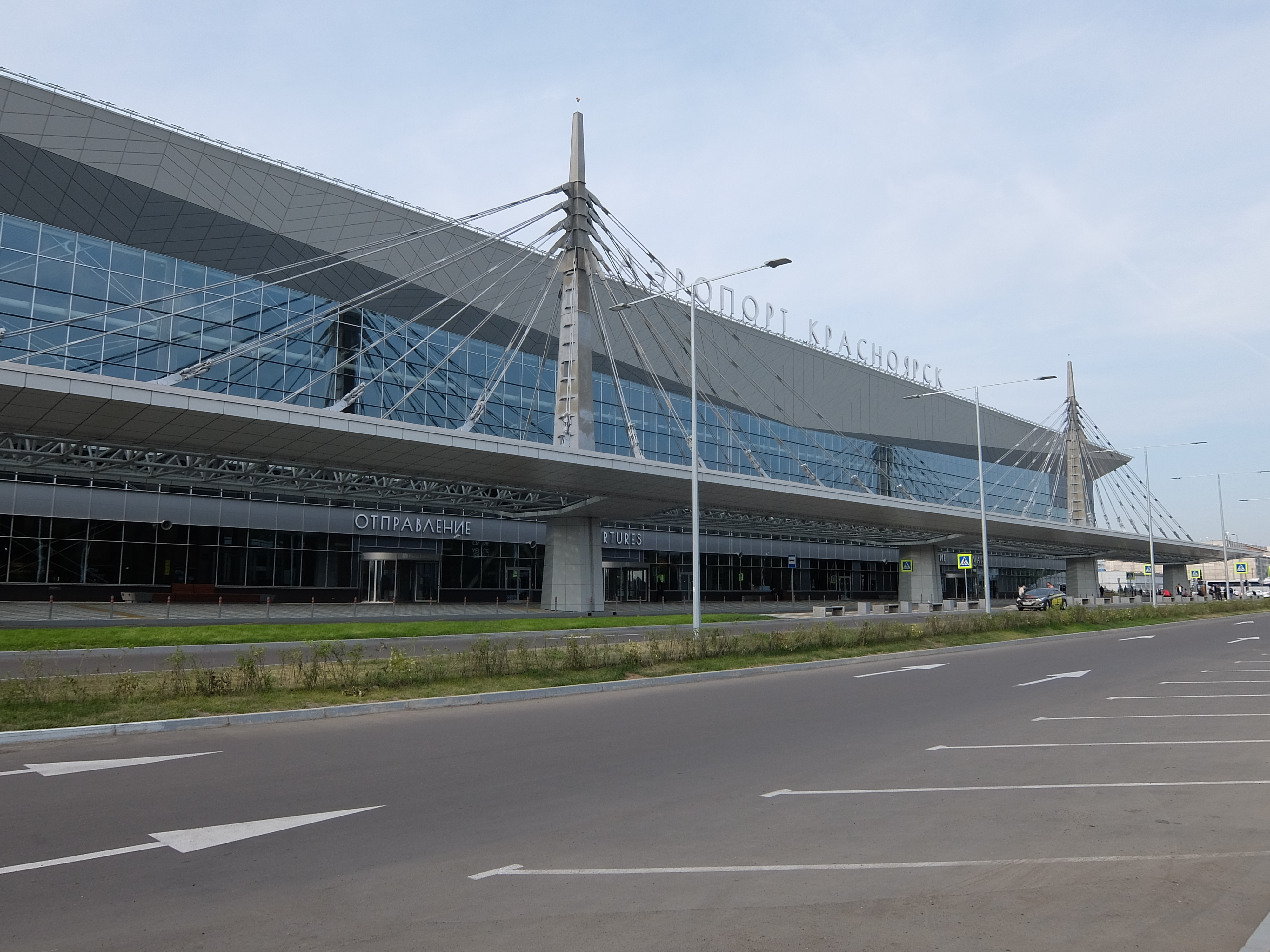 Новый пассажирский терминал аэропорта Красноярск